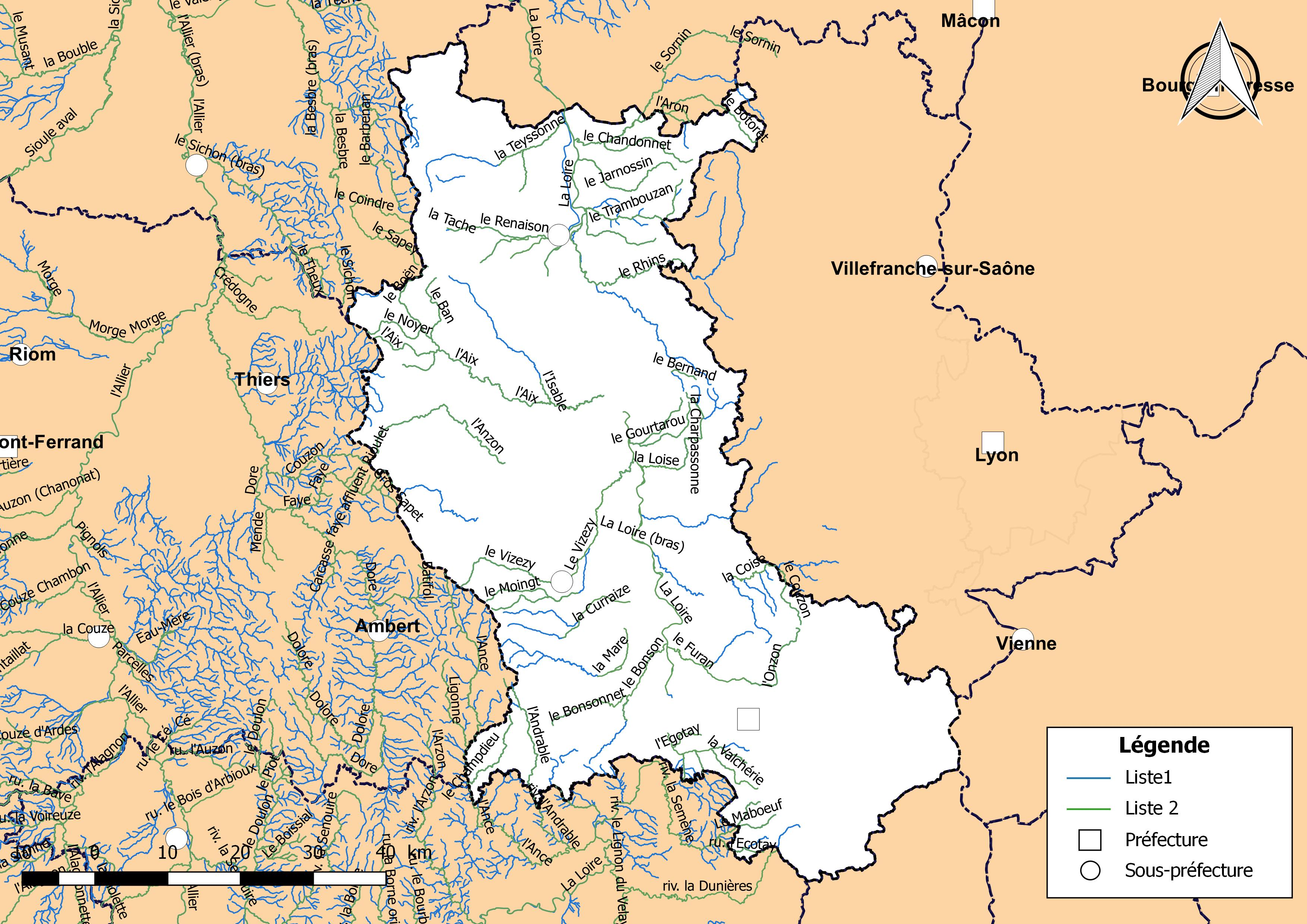 Classement des cours d'eau du département de la Loire (France) au titre de la continuité écologique (article L214.17 I du Code de l'environnement).